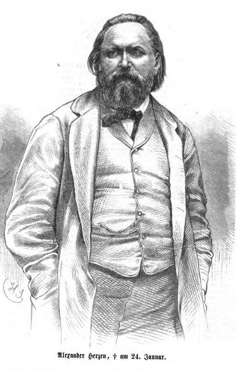 Alexander Herzen, russischer Philosoph, Schriftsteller und Publizist im 19. Jh.